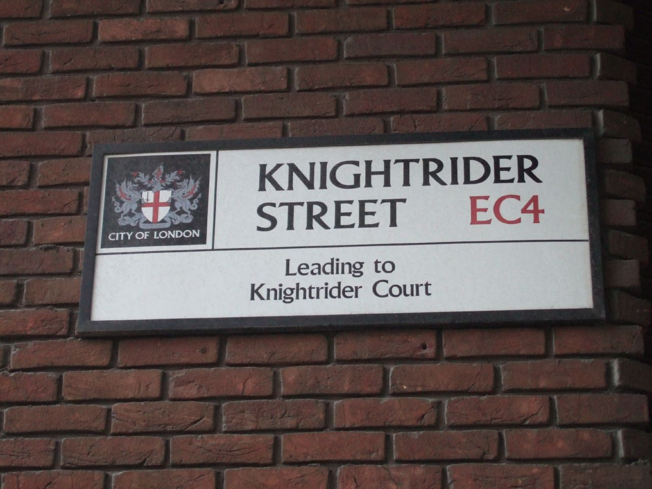 Street sign for Knightrider Street, London EC4